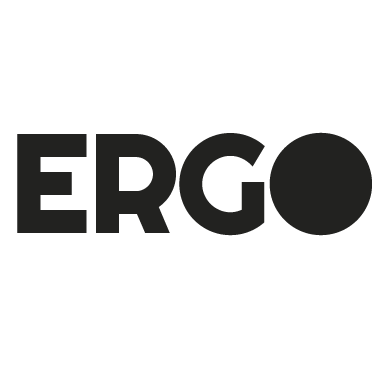 Tidningen Ergos logga sedan 2016.